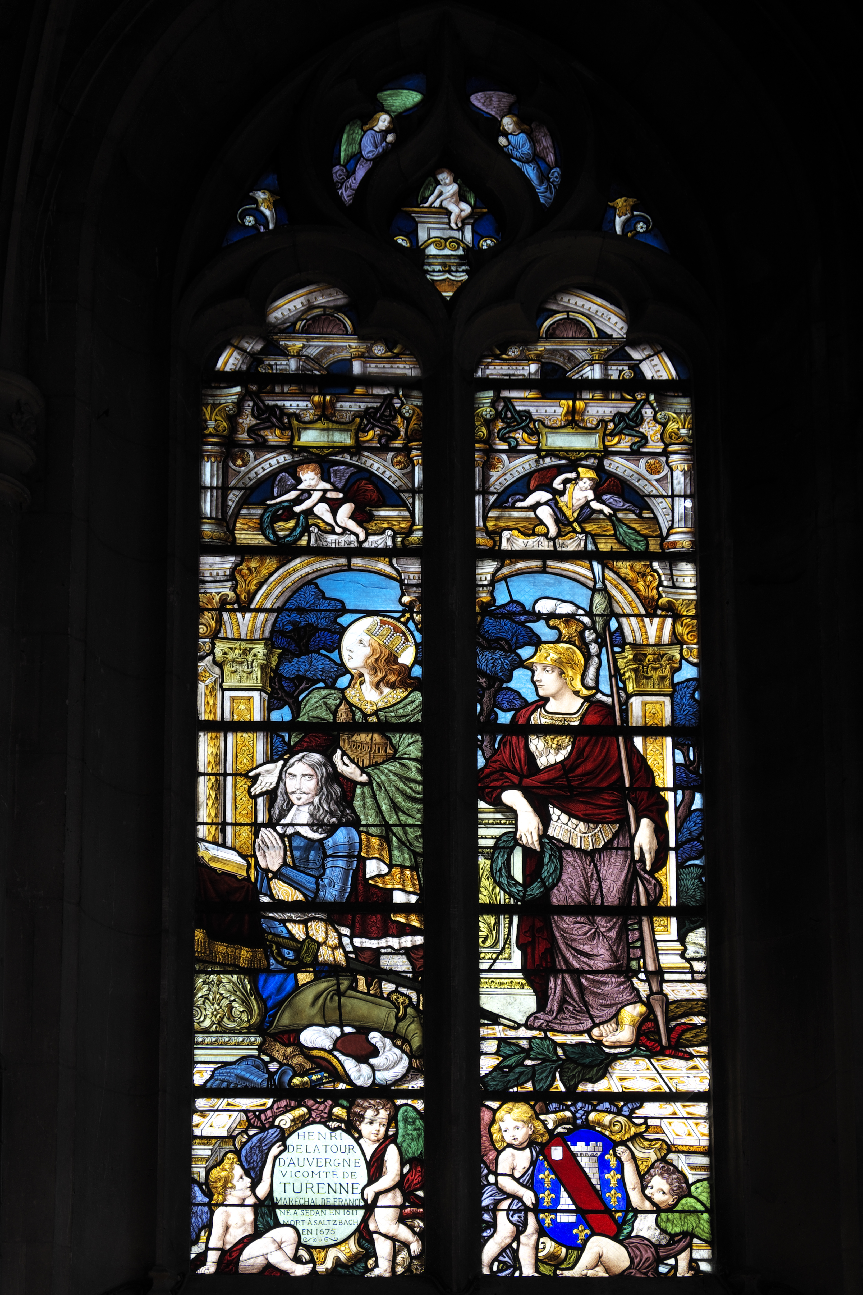 Katholische Pfarrkirche Saint-Martin (Collégiale Saint-Martin) in Montmorency im Département Val d'Oise (Île-de-France/Frankreich), Bleiglasfenster aus dem 19. Jahrhundert, Darstellung: Heinrich II. mit einem Modell des Doms von Bamberg und Henri de La Tour d’Auvergne, rechts Allegorie der Tapferkeit